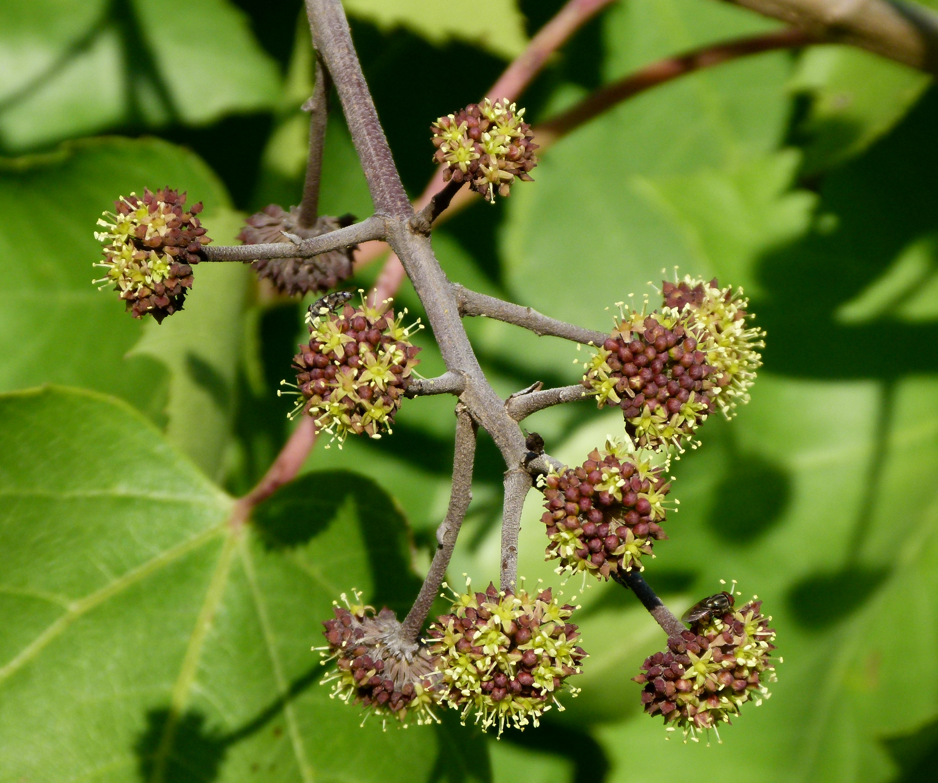 Jardin botanique de Barcelone